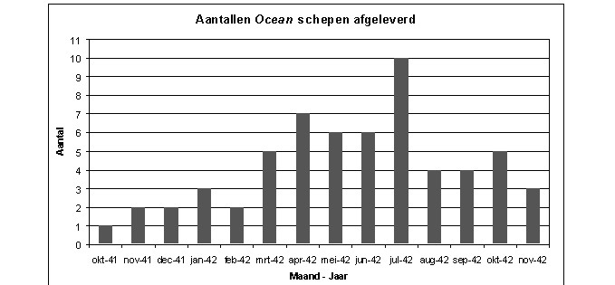 Afleverschema van de Ocean schepen